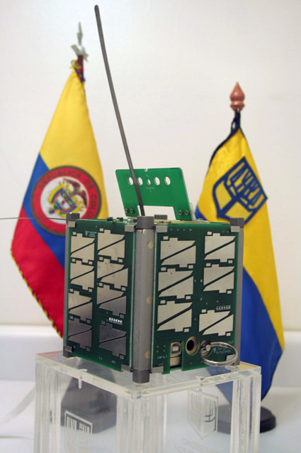 Pico-satelite Libertad-1.